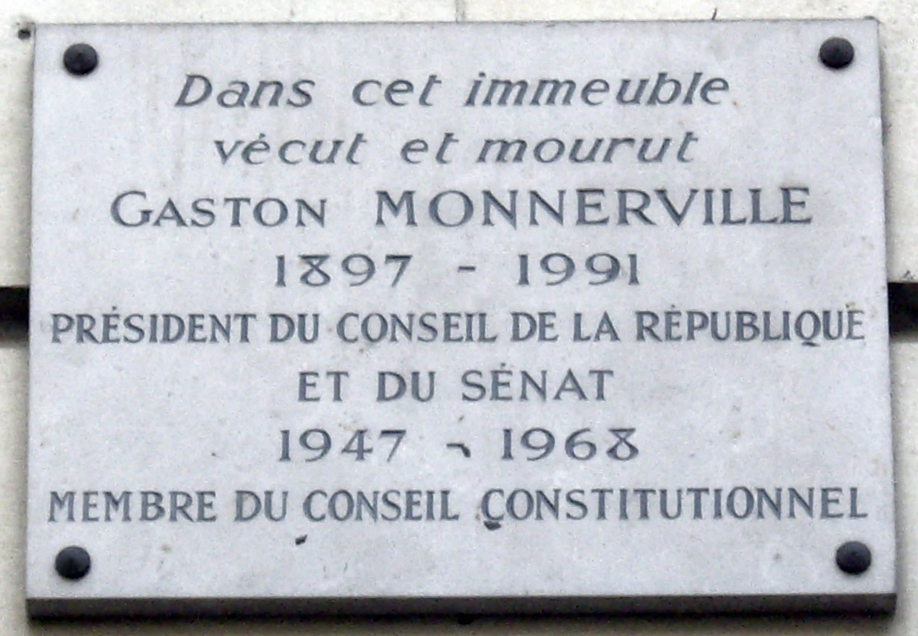 Plaque commémorative, 27 avenue Raymond-Poincaré, Paris 16e. « Dans cet immeuble vécut et mourut Gaston Monnerville, 1897-1991, président du Conseil de la République et du Sénat, 1947-1968, membre du Conseil constitutionnel. »